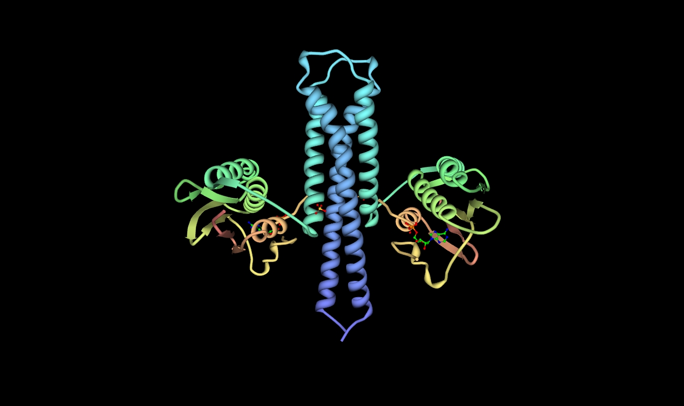 Reconstrucción de la estructura de una histidina quinasa en base a su estructura PDB 2c2a